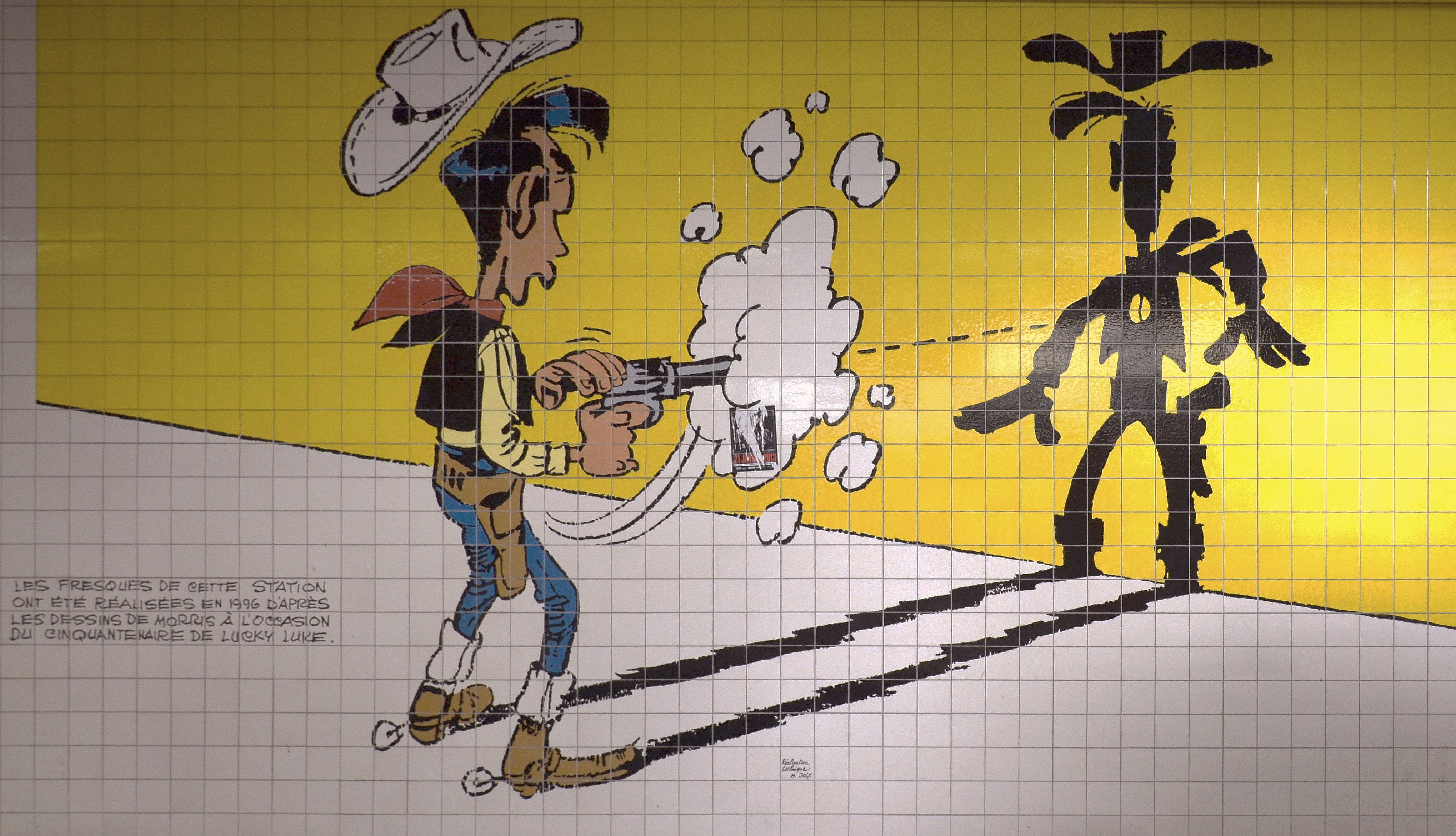 Charleroi - Station de métro Parc - céramique représentant Lucky Luke héros de la série de bande dessinée humoristique créé par Morris. Réalisée en 1996 à l'occasion du cinquantenaire de la série.